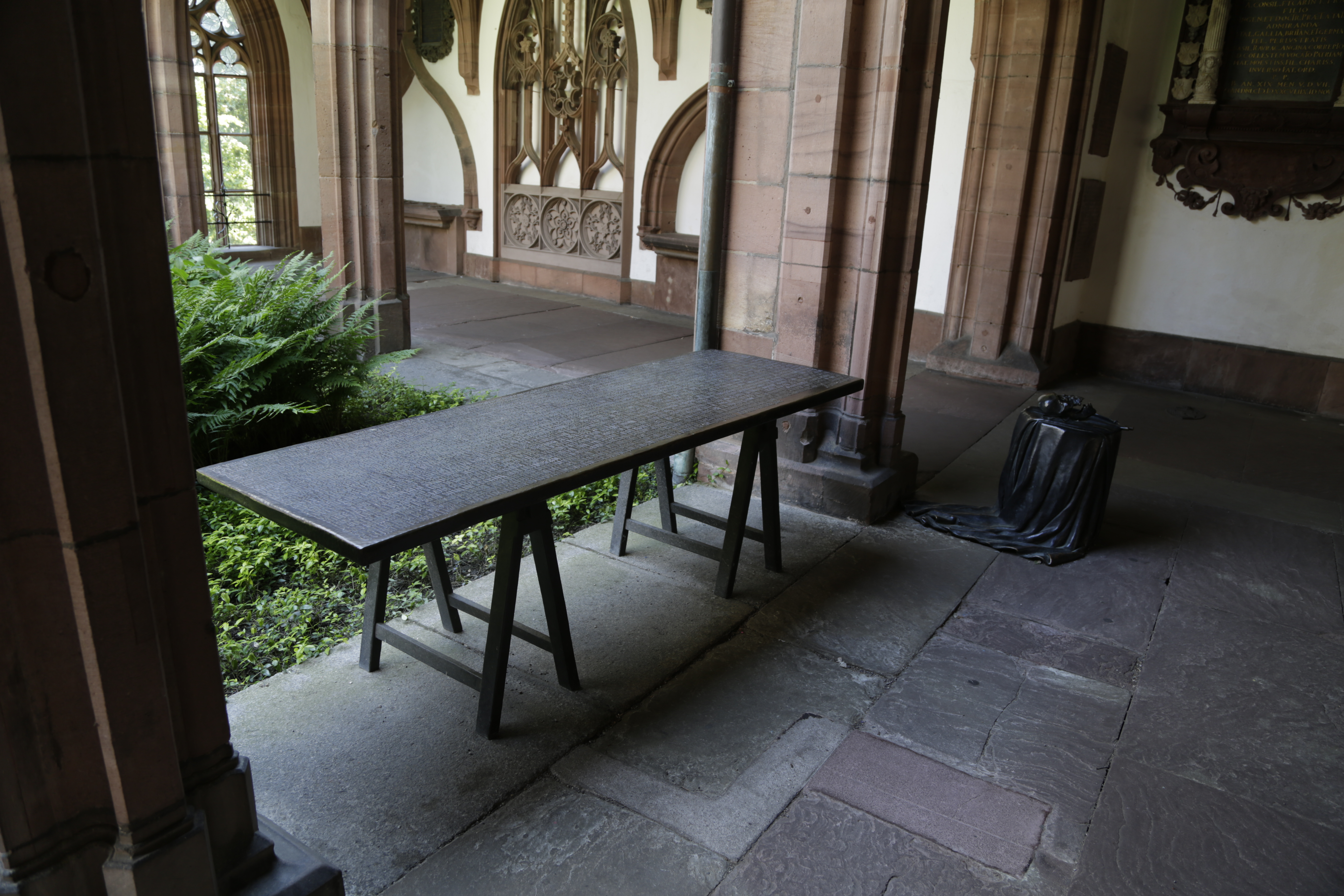 Die Markttische im Kreuzgang des Basler Müsters, sind eine Arbeit von Bettina Eichin.